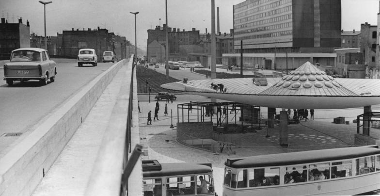 Halle, Hochstraße, Straßenbahn Zentralbild Schaar 15.7.1968 Halle-Thälmannplatz Eine moderne Verkehrslösung nimmt Gestalt an. Die Umgestaltung des Halleschen-Thälmannplatzes zeigt unser Foto. Hochstraße und Fußgängertunnels sind in Betrieb.